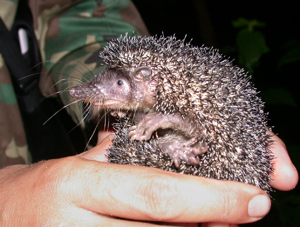 Greater Hedgehog Tenrec (Setifer setosus)